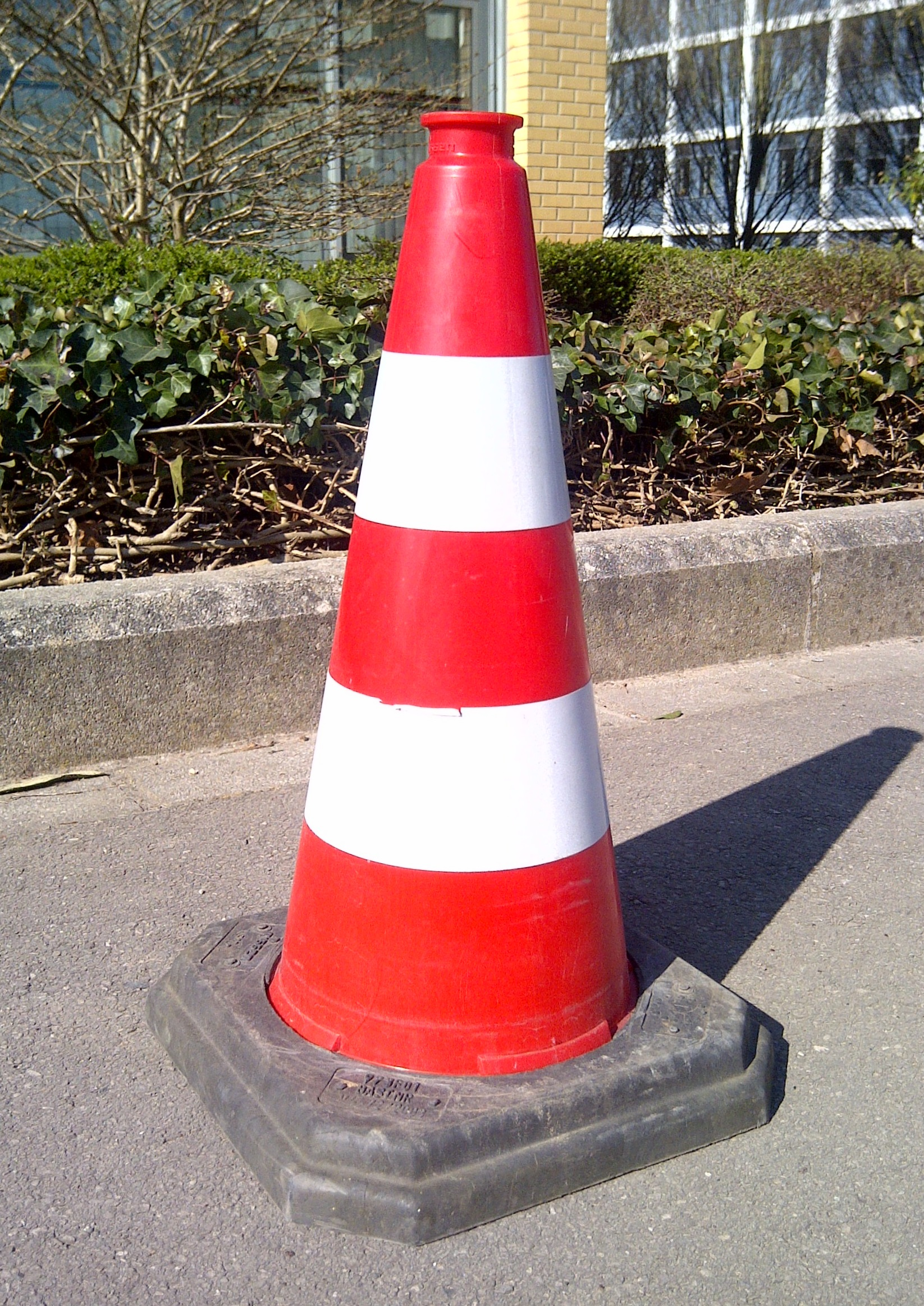 Verkéiersschëld E,24d "Kegel" aus dem lëtzebuerger Code de la Route.